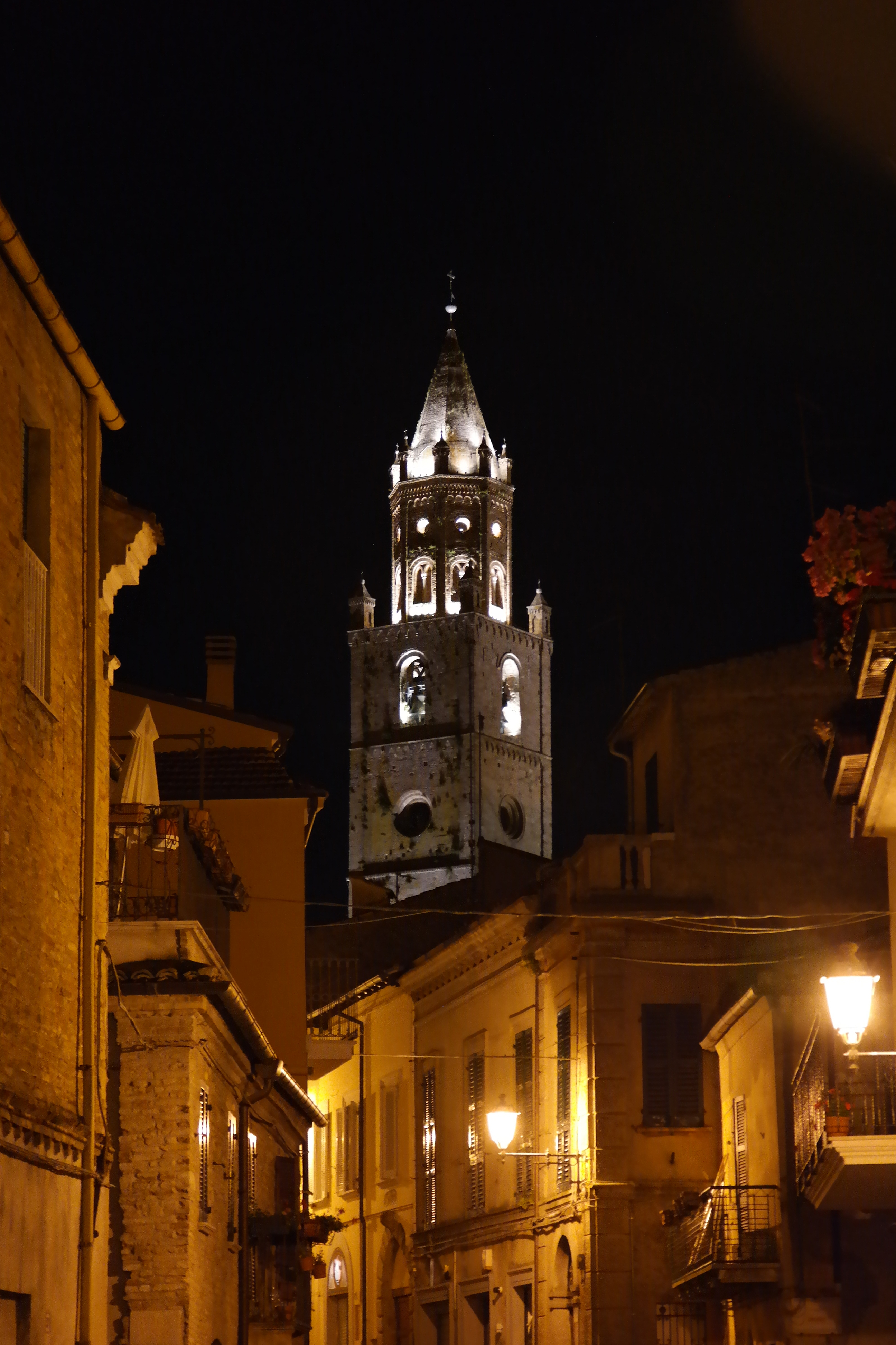 Campanile del Duomo di Atri illuminato